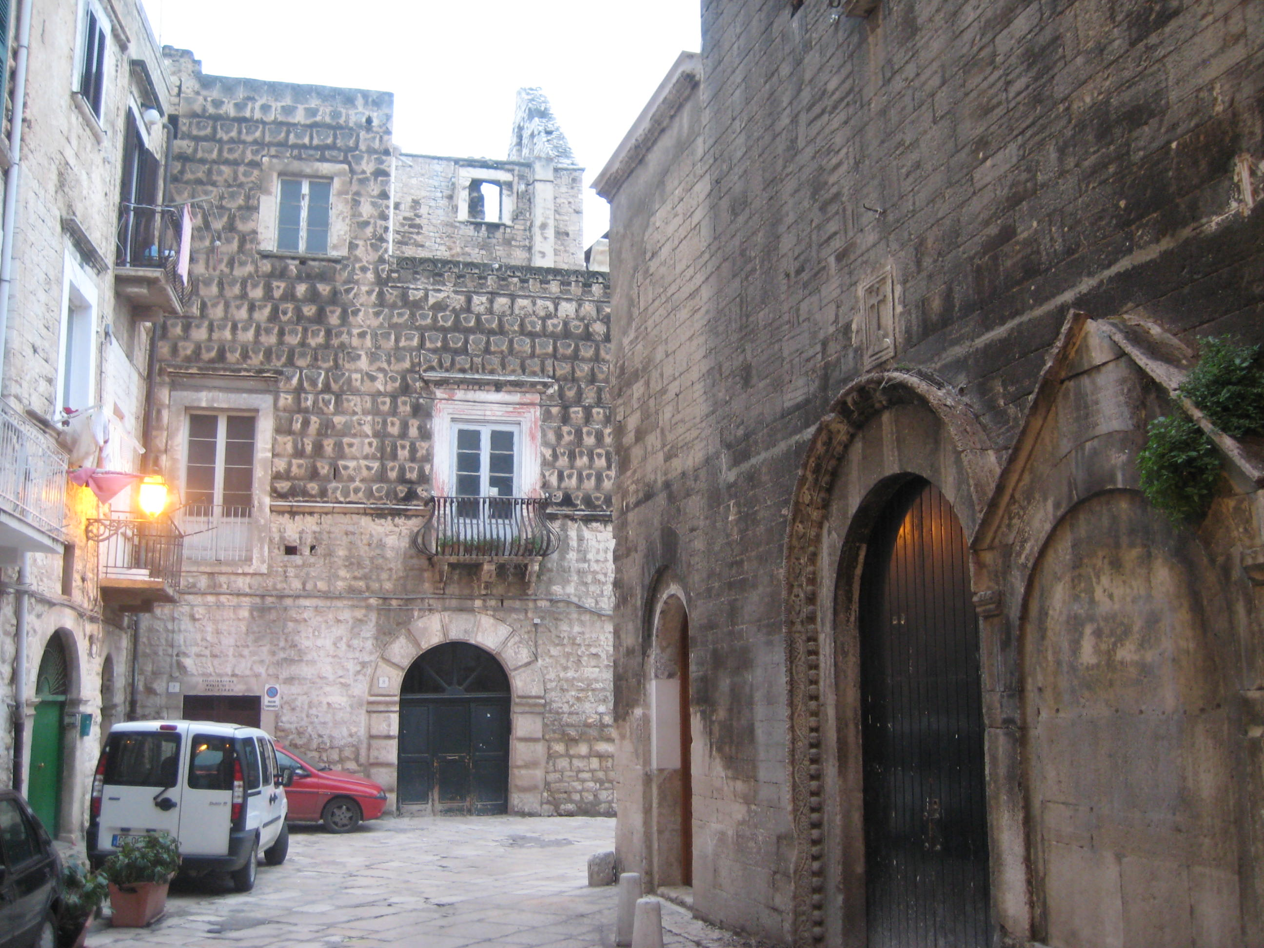 Bisceglie. L'abbazia di Sant'Adoeno. Sullo sfondo il palazzo Lucrezia Borgia.